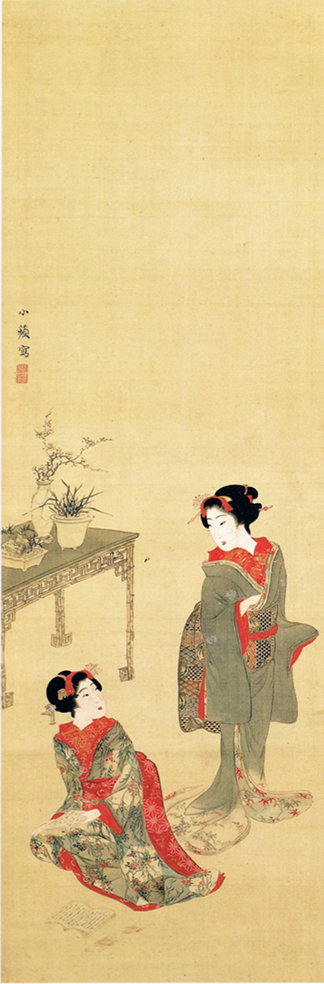 野口小蘋「美人図」 関西大学所蔵